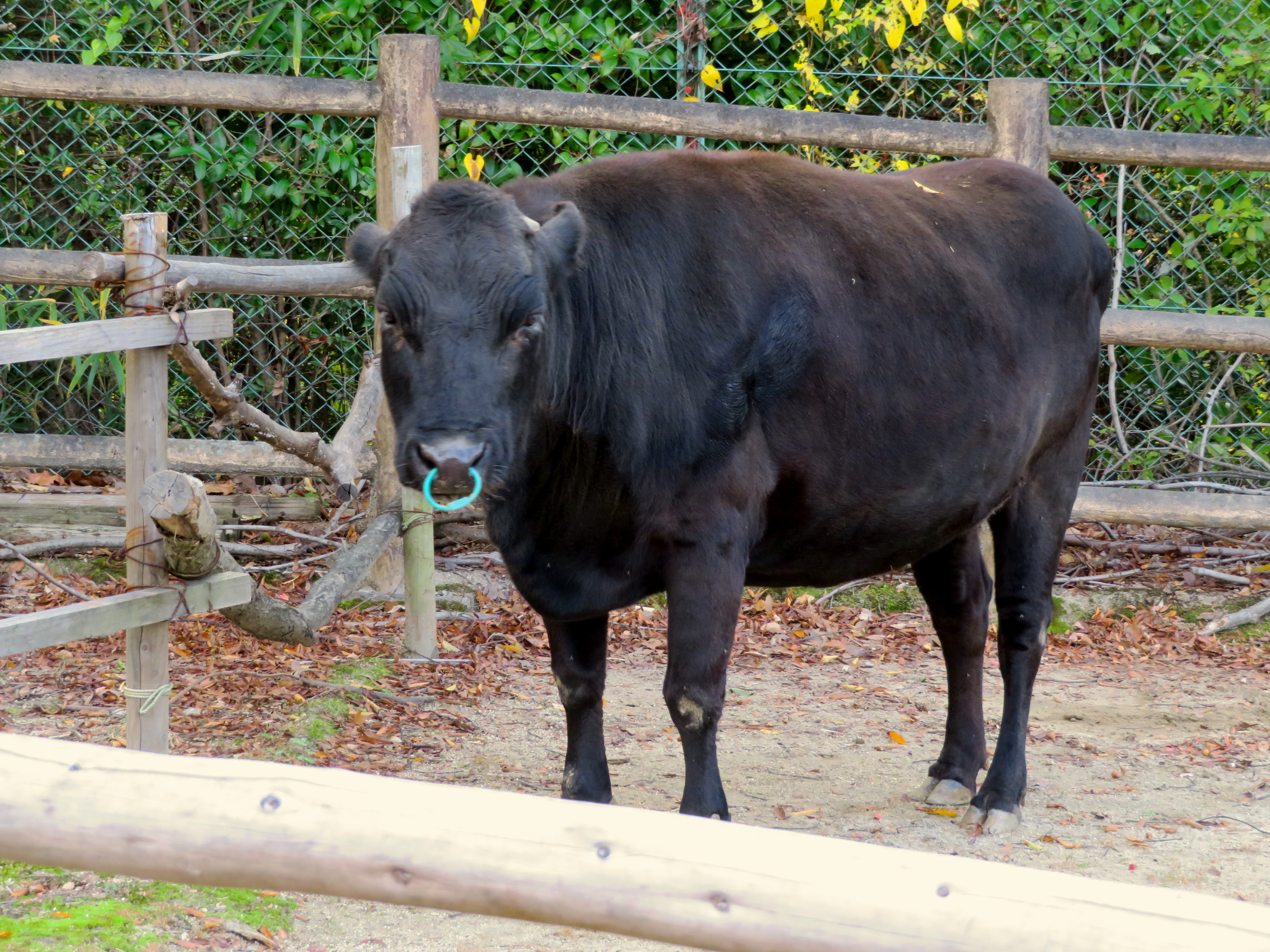 東山動植物園の「こども動物園」内で飼育されてる口之島牛。